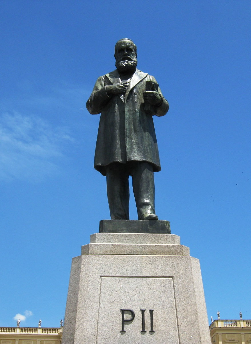 Foto do Museu Nacional da UFRJ, no Paço de São Cristóvão, Rio de Janeiro, Brasil.